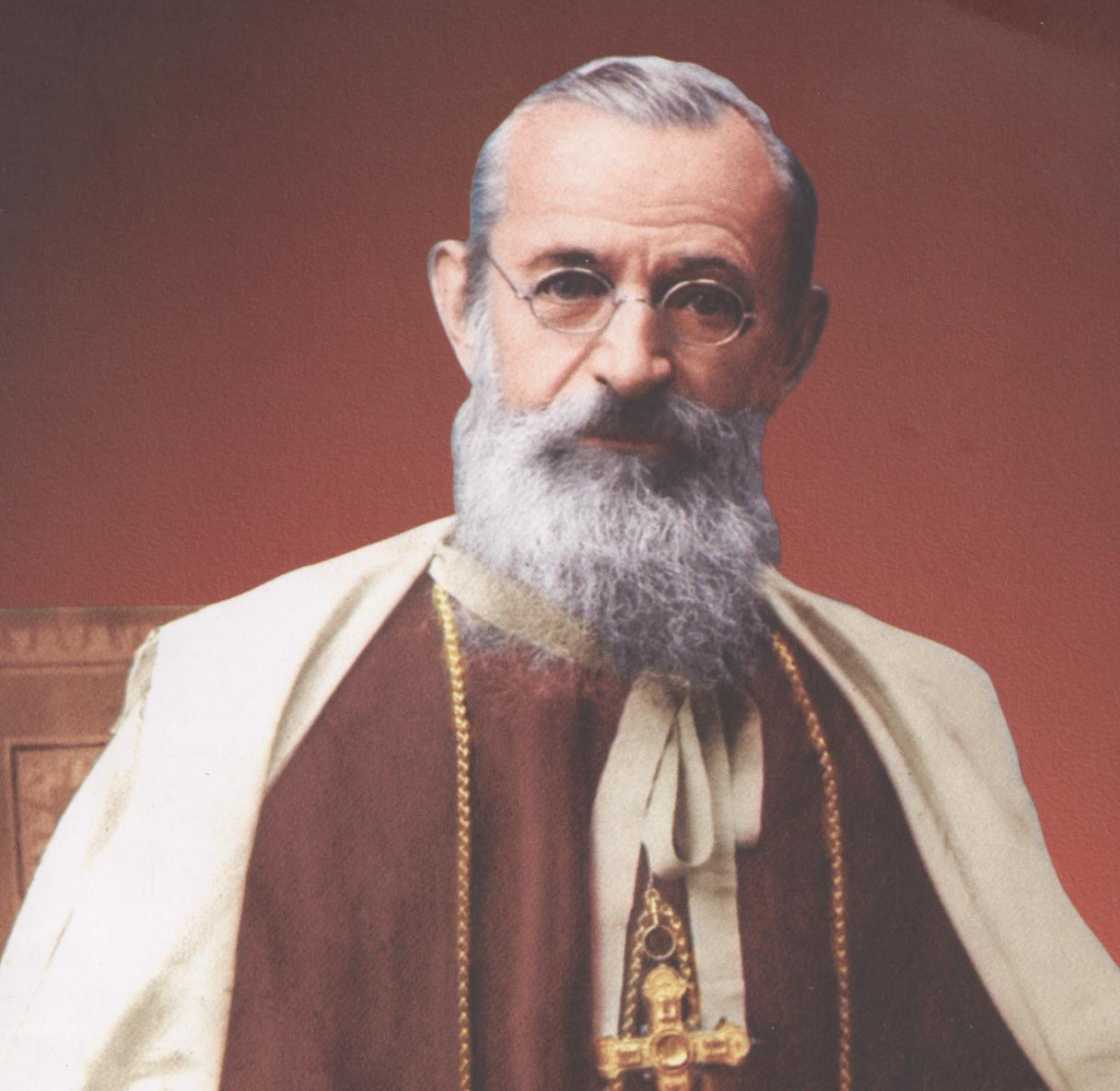 Bischof Aloisius Benziger, Schweiz, Quilon Indien